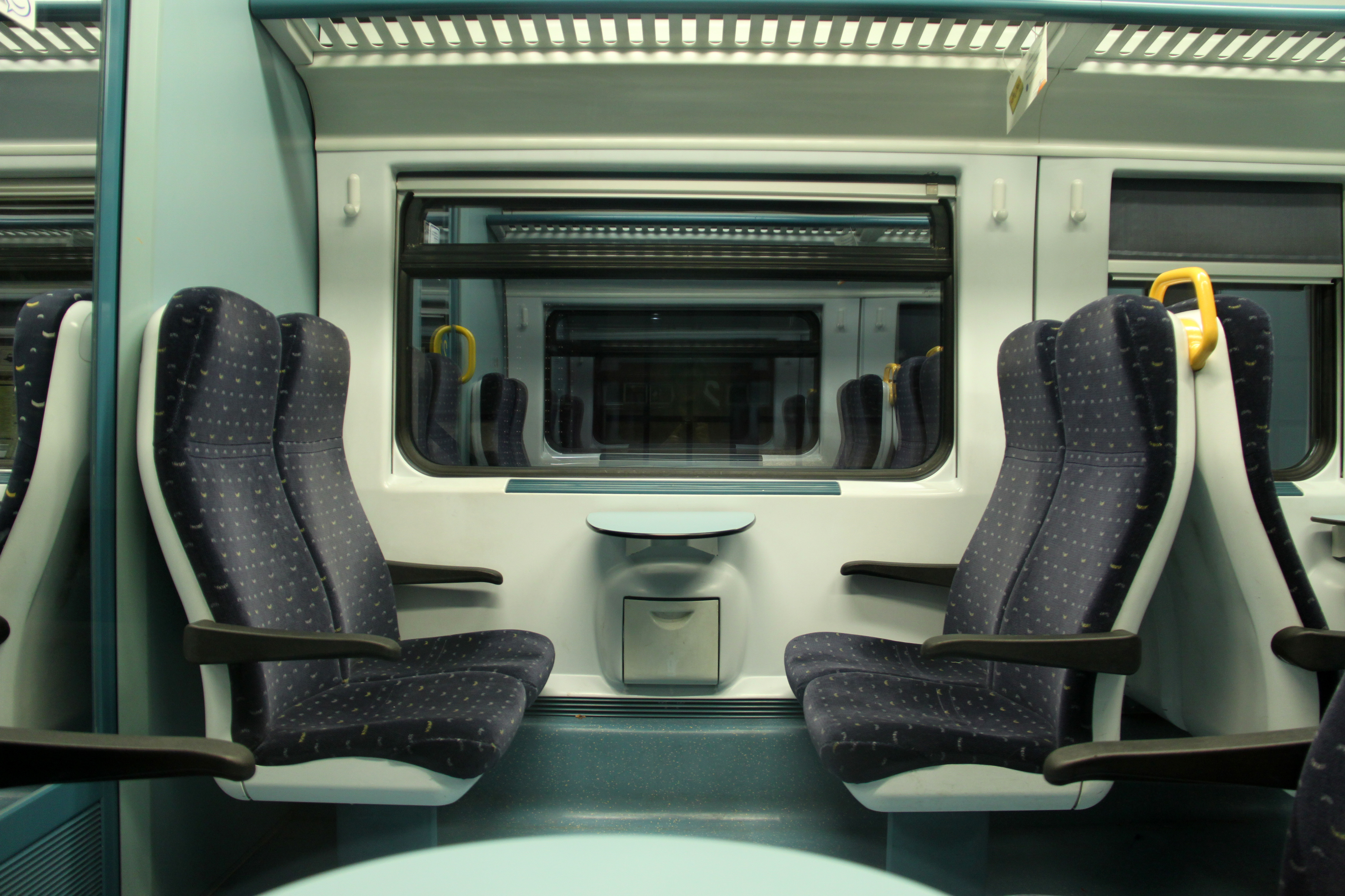 Interieur 1e klasse van de Belgische motorwagens serie MW41. Let er op dat er weinig tot geen verschil lijkt te zijn tussen de 1e en 2e klasse.